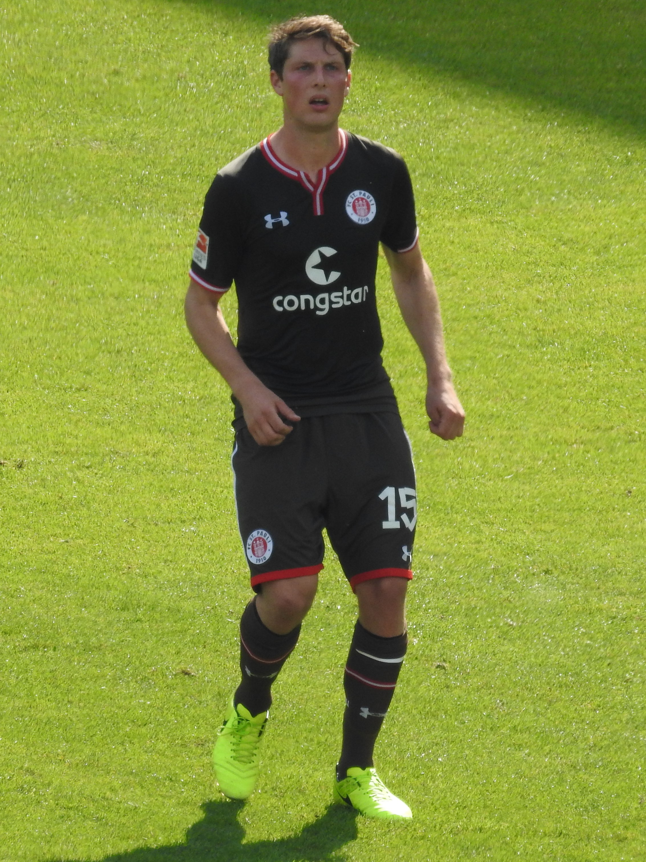 Daniel Buballa